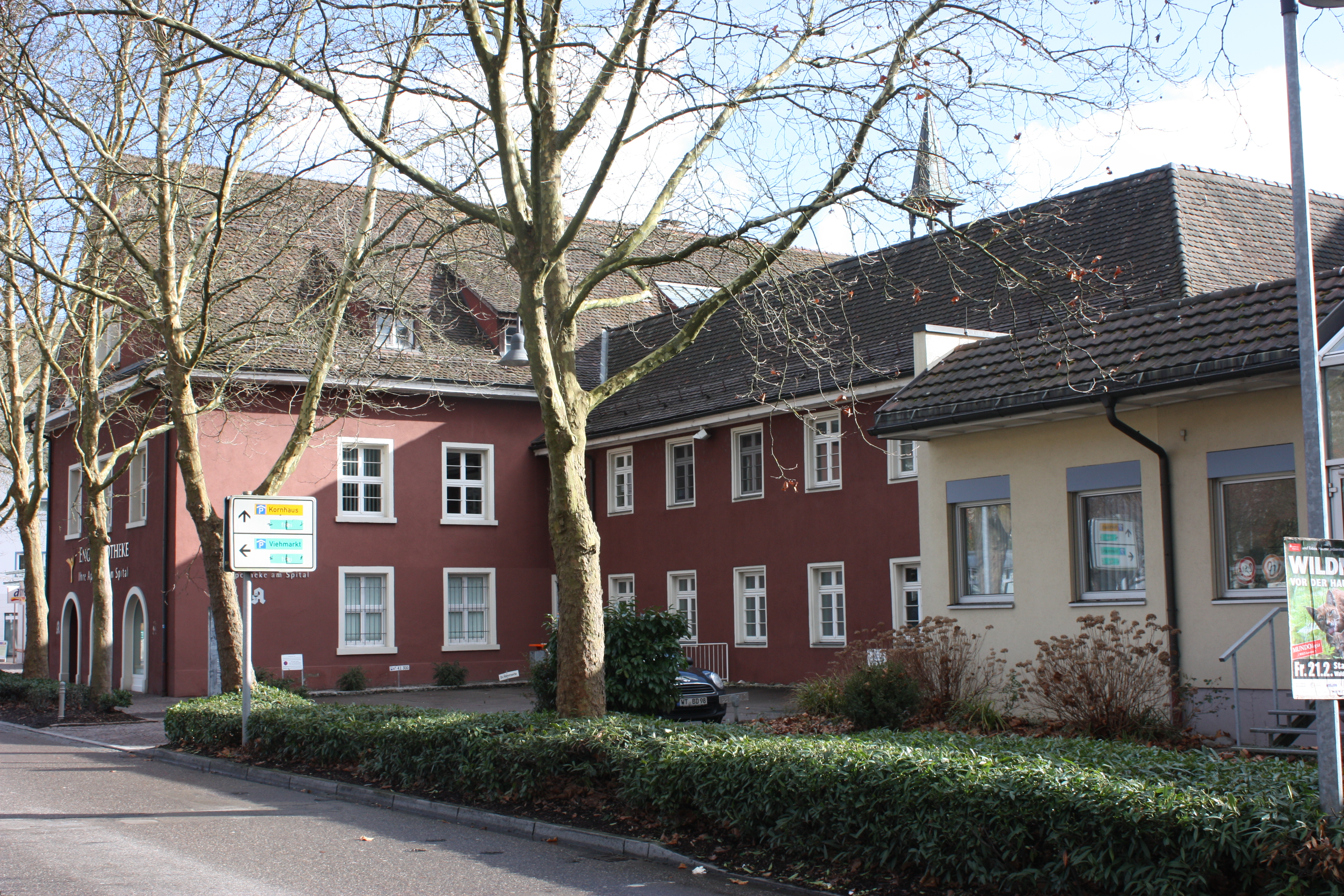 Ehemaliges Kapuzinerkloster Waldshut von Westen aufgenommen.